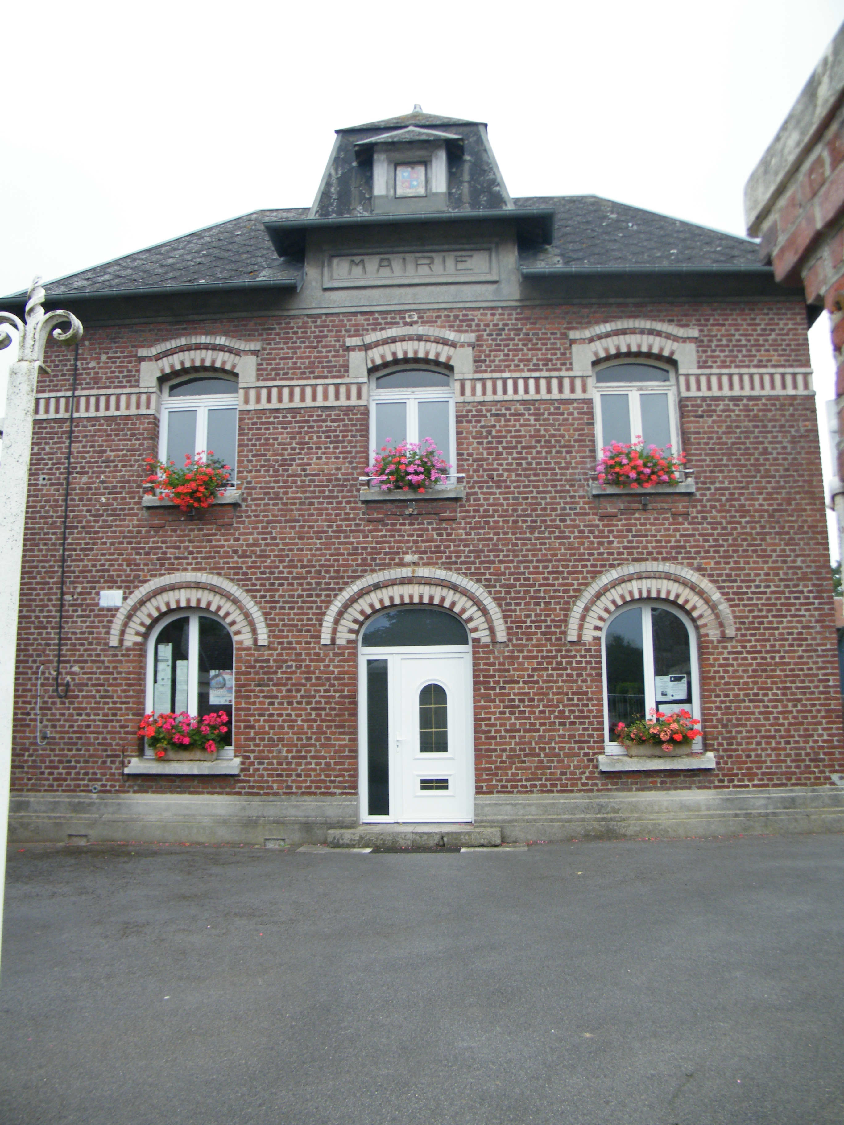 Mairie.